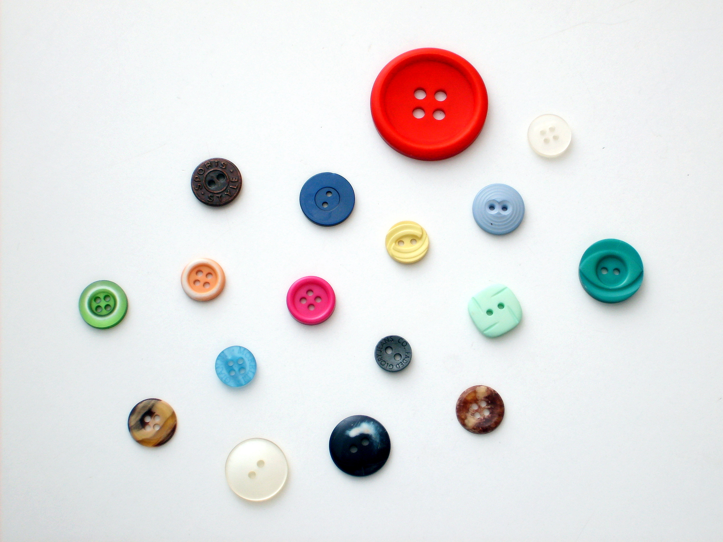 Botones de diferentes tamaños, colores, formas y materiales.